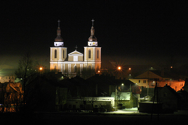 Stawiski nocą